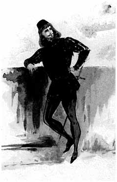 Roméo by Bianchini, aquarelle for projet de costume